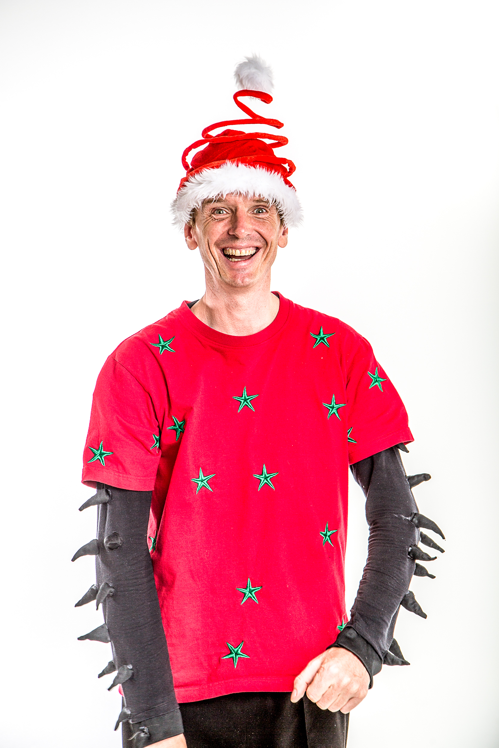 Ove Rocketroll spilt av Ove Storland